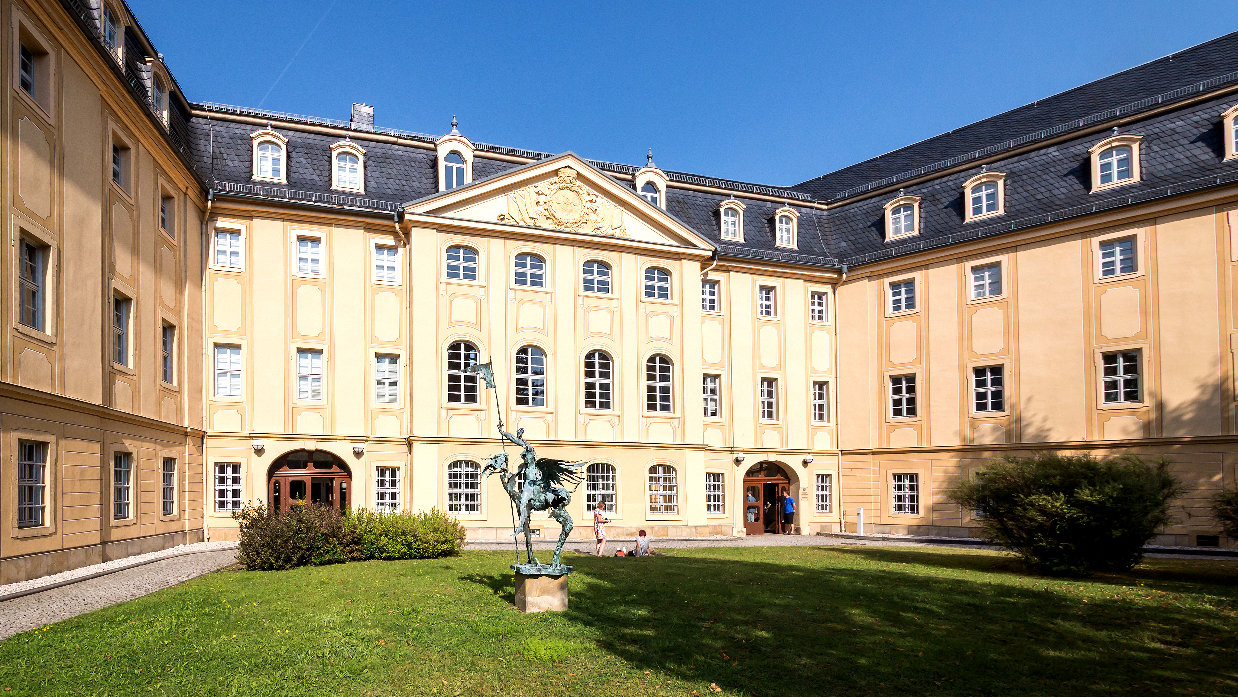 Rudolstadt Burgstraße 1 Thüringer Rechnungshof 1